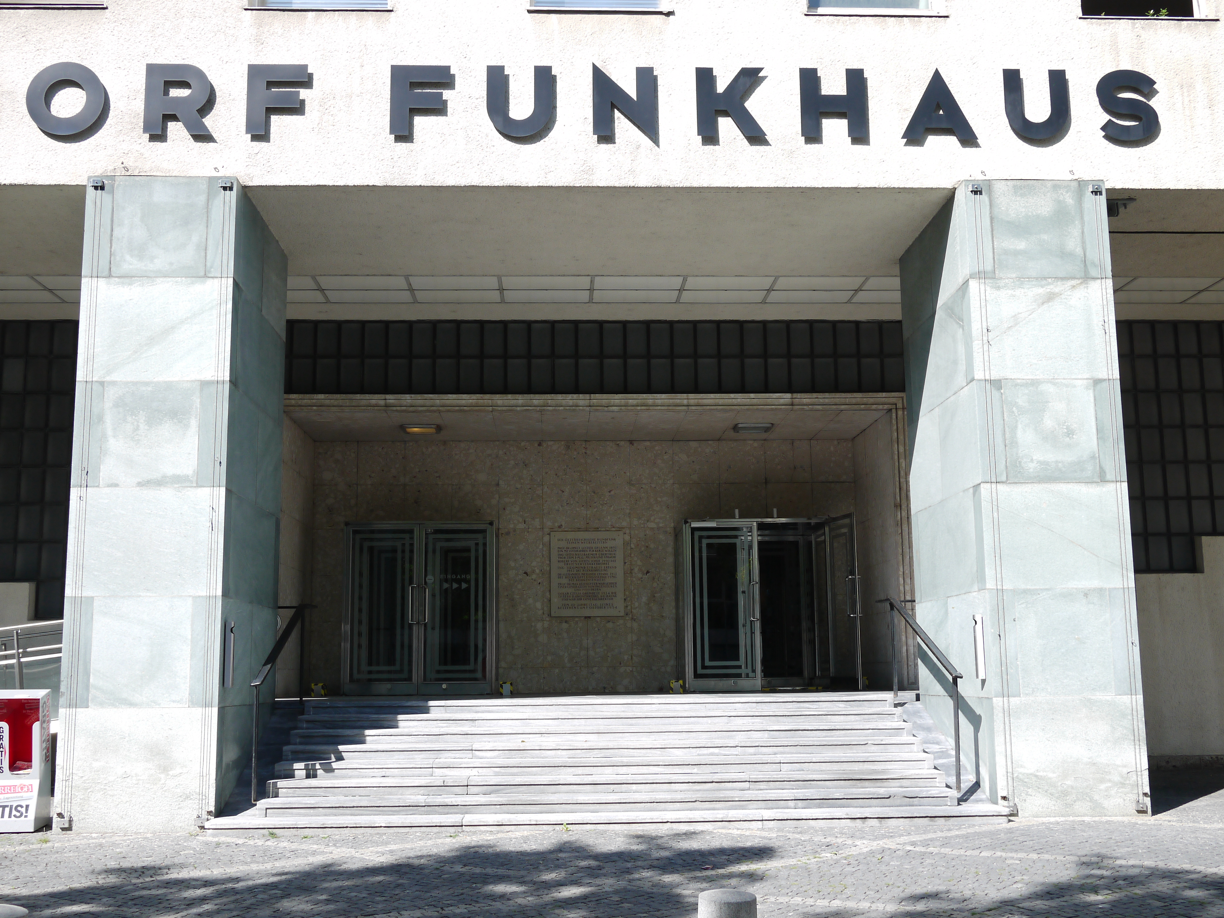 Funkhaus, ORF